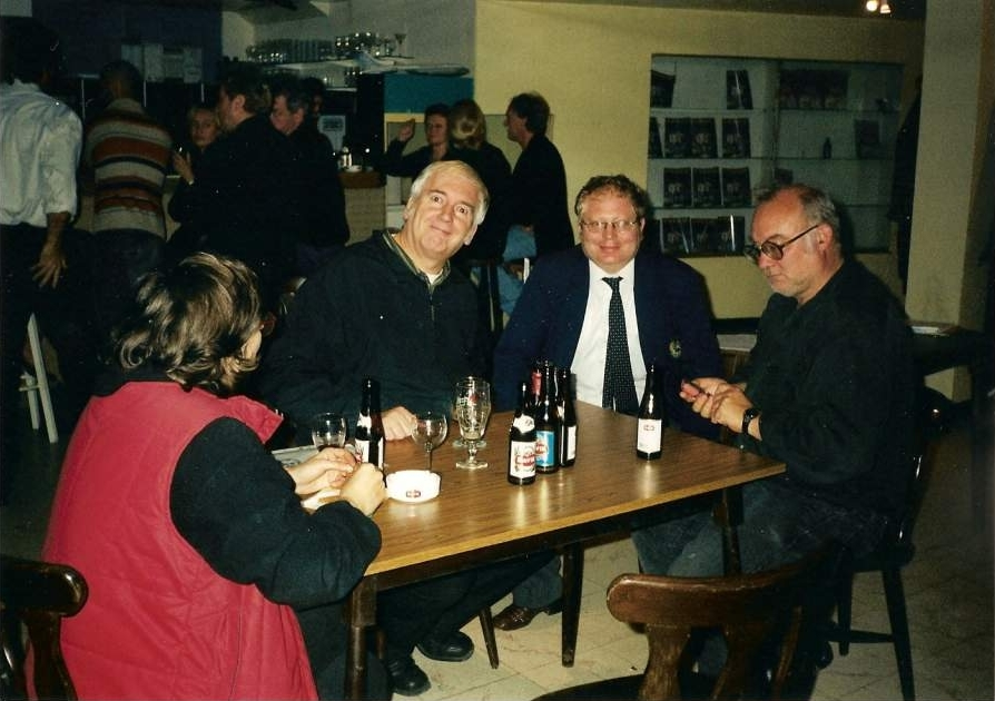 De gauche à droite : Sylvie (femme de Noël Godin), Noël Godin, Francis De Smet, Jan Bucquoy ; à Harelbeke en Belgique.